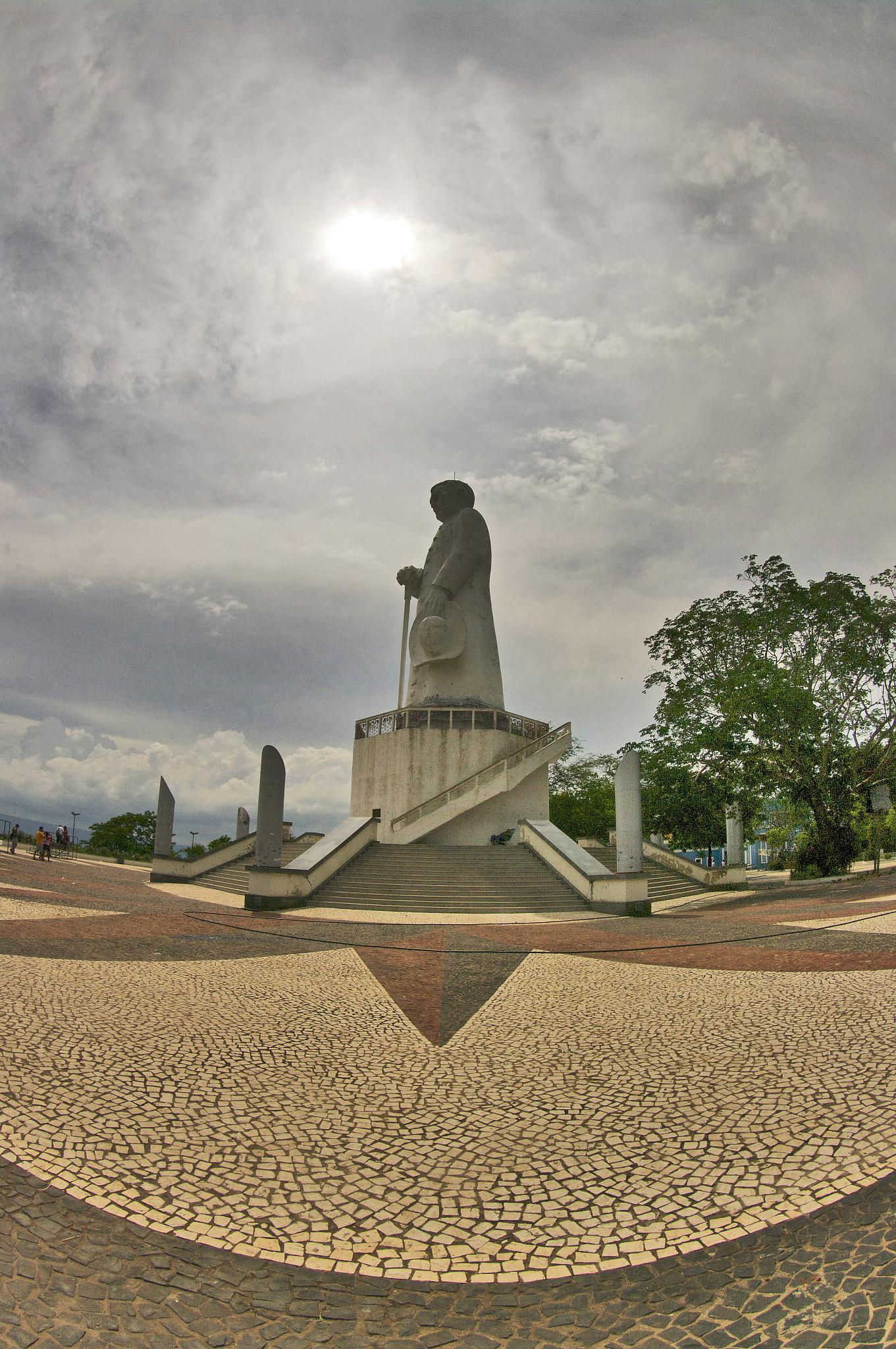 No Santuário de Romão Batista